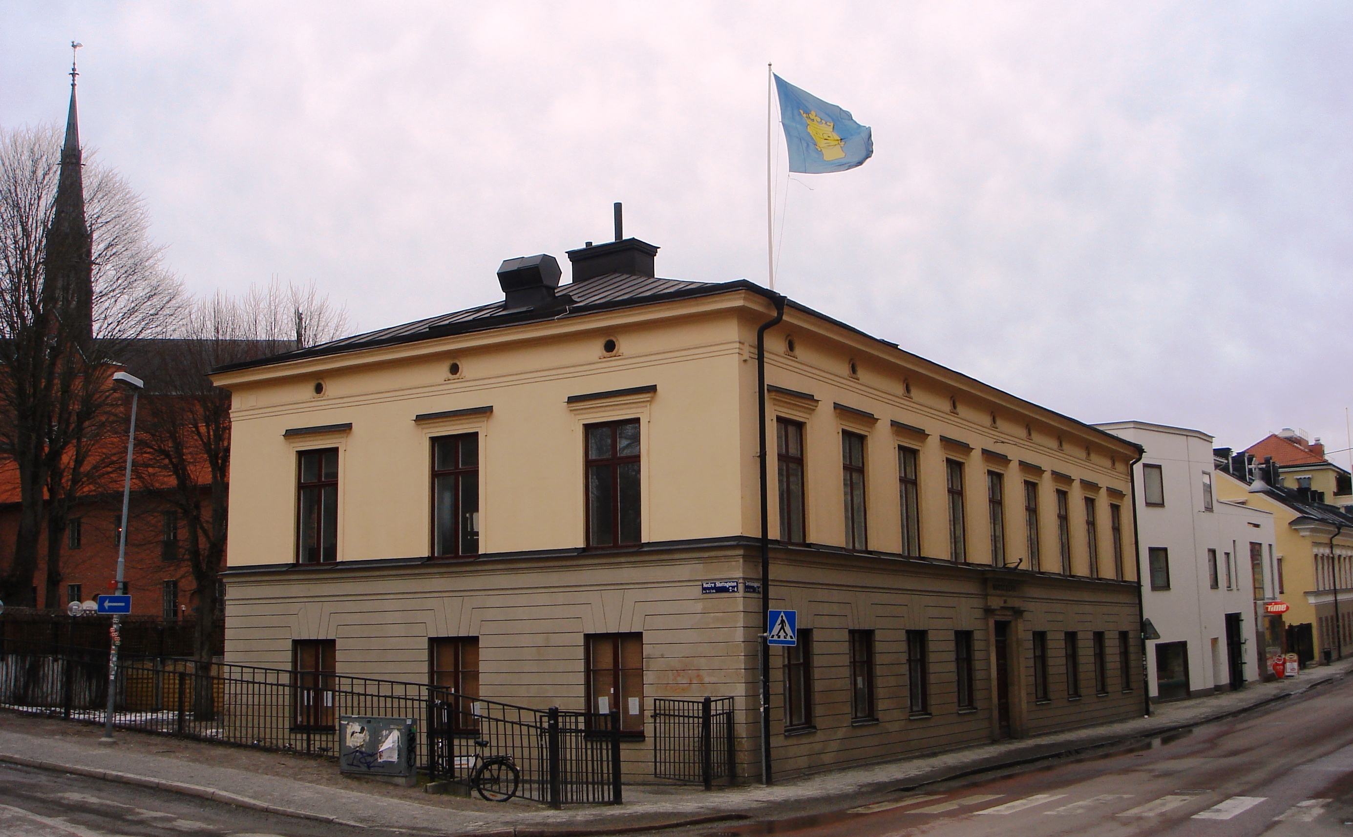 Stockholms nation, Uppsala, Sweden